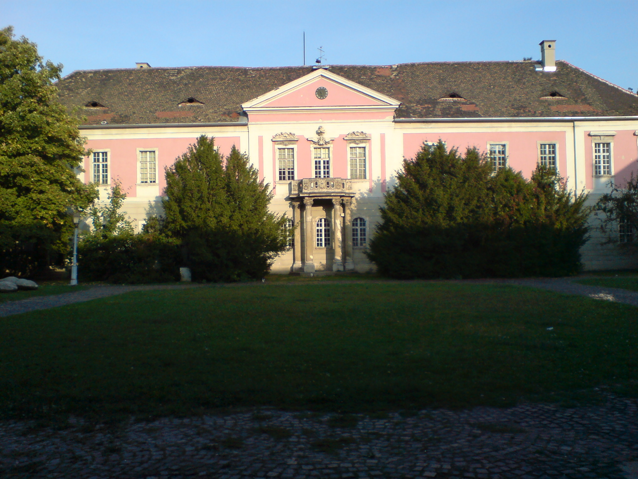 Schloss Zichy, Budapest